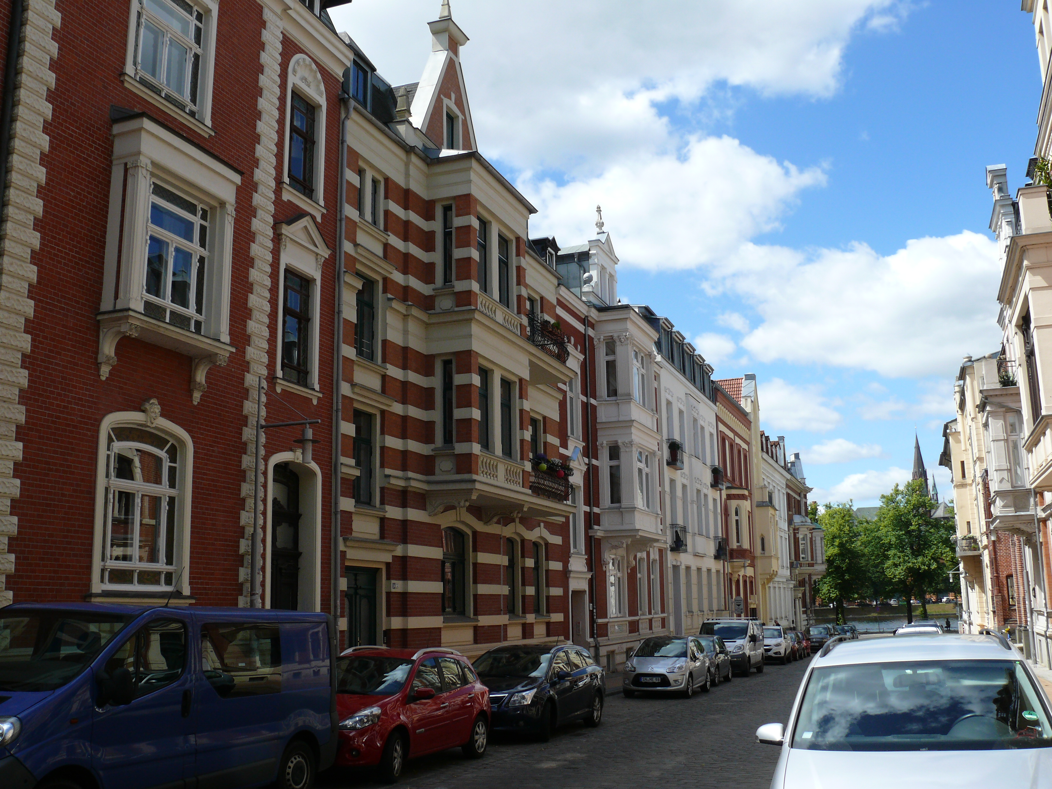 Das Gebäude "Körnerstraße 14" in Schwerin.